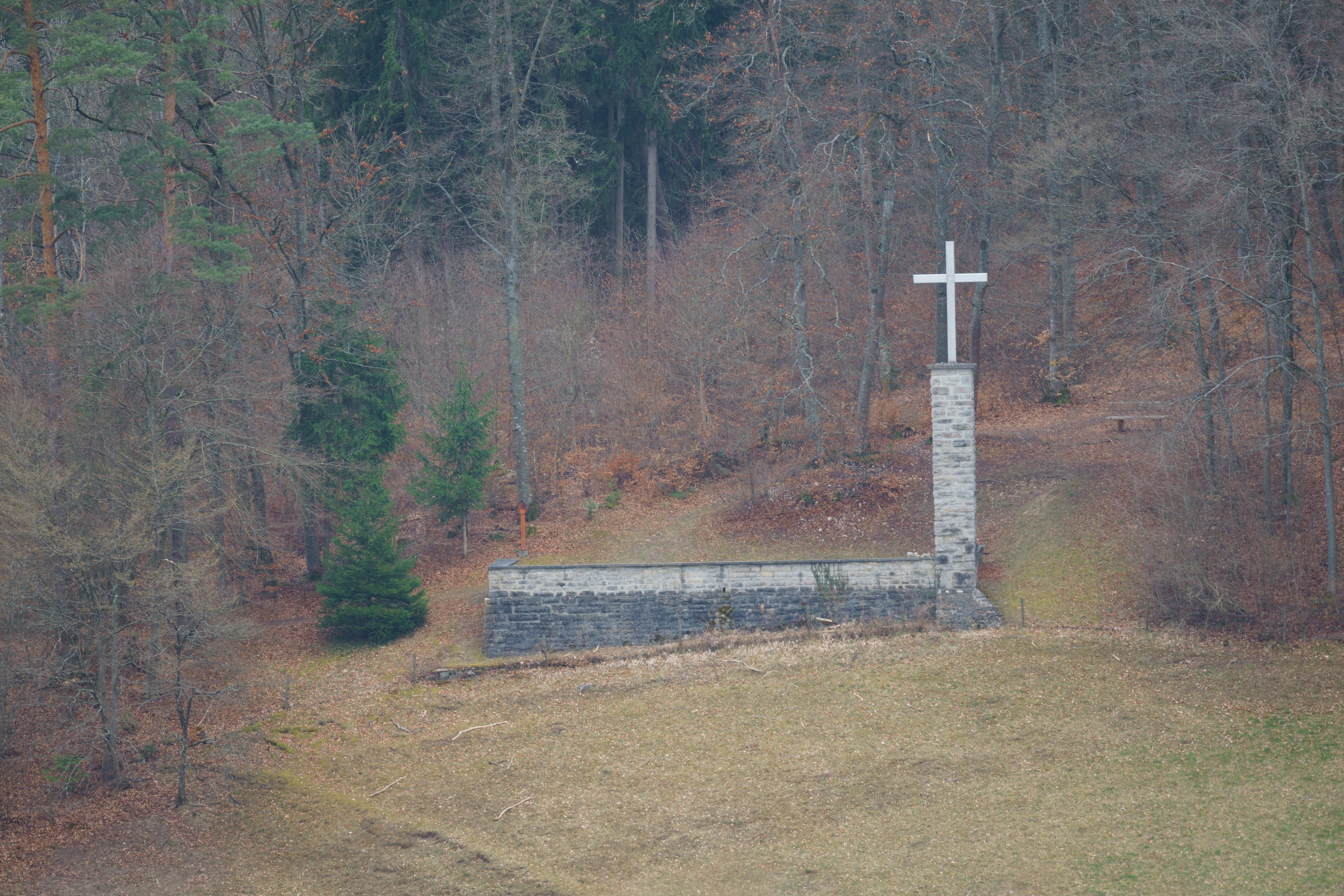 Ansichten von Rexingen (Horb am Neckar)